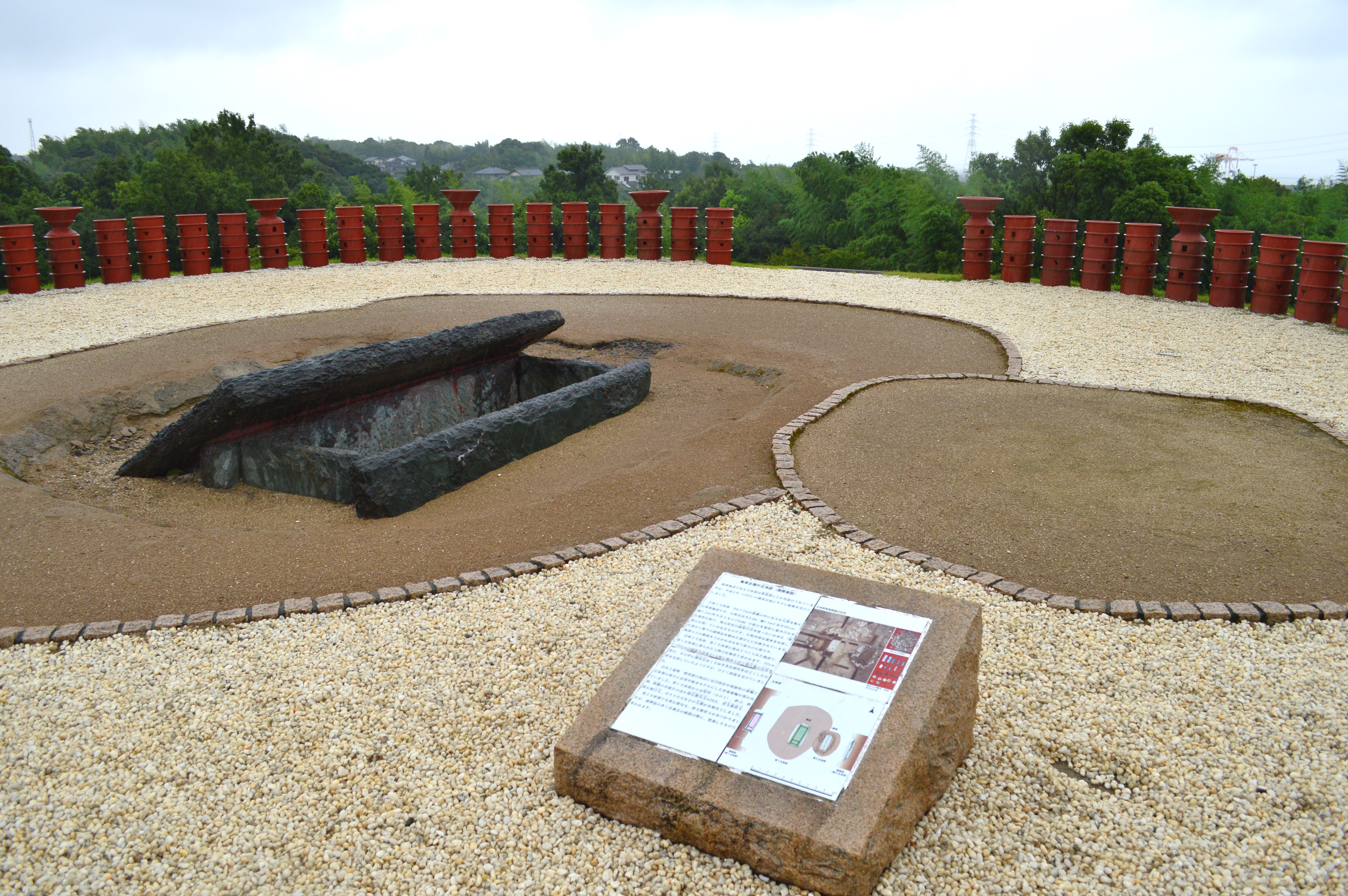 亀塚古墳 (大分市) 墳頂部